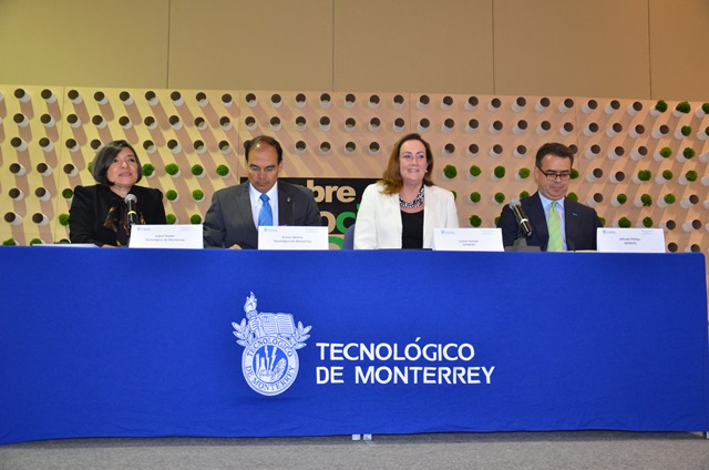 Isabel Studer, Arturo Molina, Louise Goeser y Alfredo Phillips en el Cumbre de Negocios Verdes del Instituto Global de Sostenibilidad en el ITESM-Campus Ciudad de Mexico